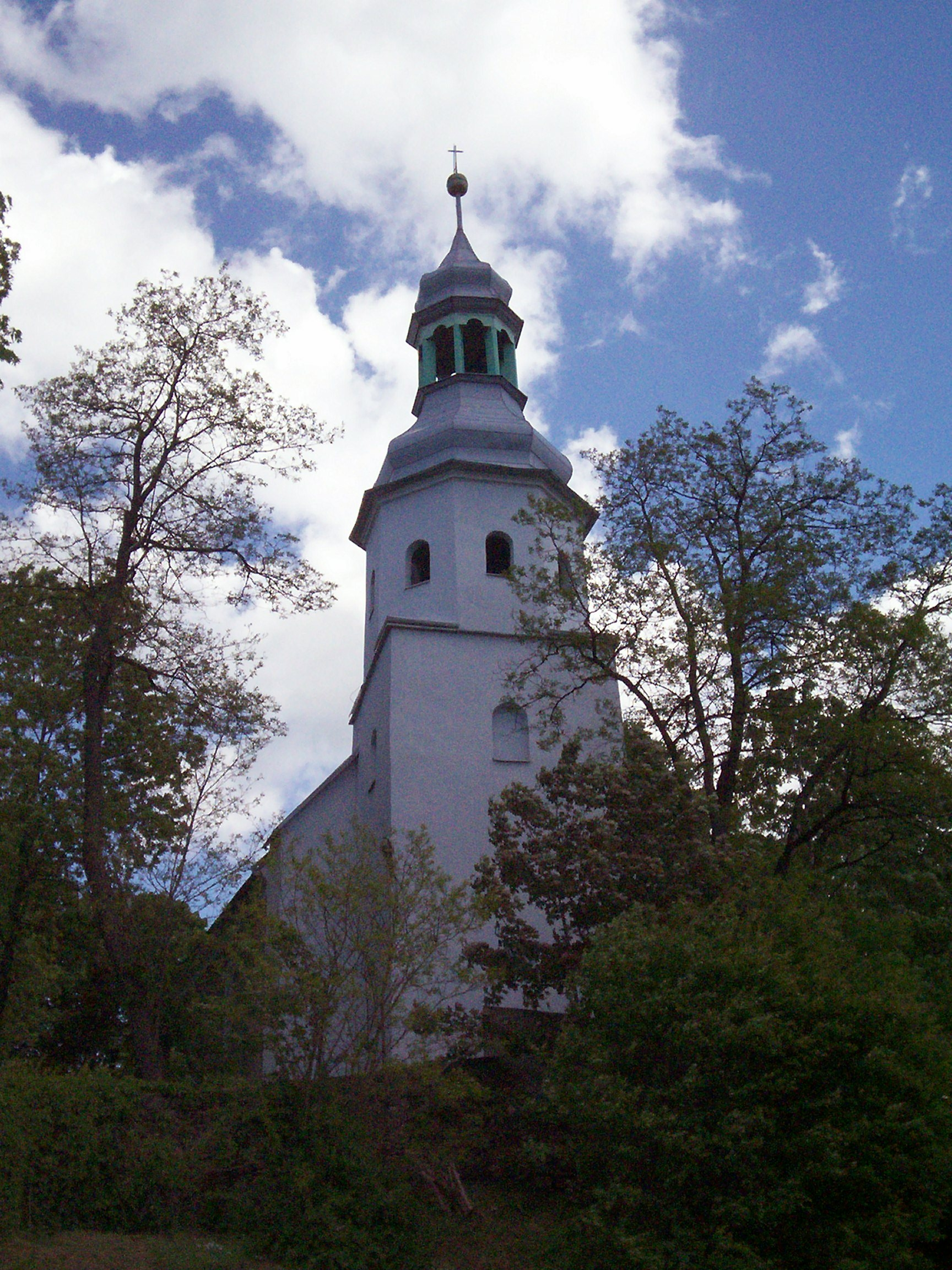 Wałbrzych Poniatów, ul. Orkana - kościół par. p.w. Serca Pana Jezusa